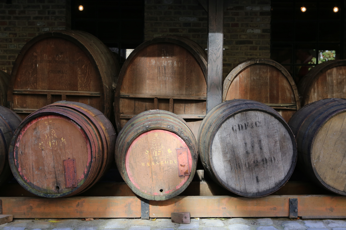 Houten vaten (bulkverpakking) in het Nationaal Jenevermuseum Hasselt, tijdens een bezoek op 26/10/2013.